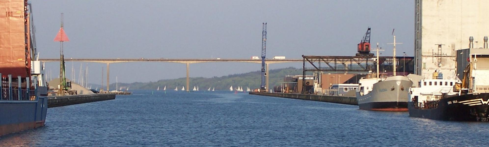 (c) 2006, Niels Elgaard Larsen Vejle Fjord Bridge